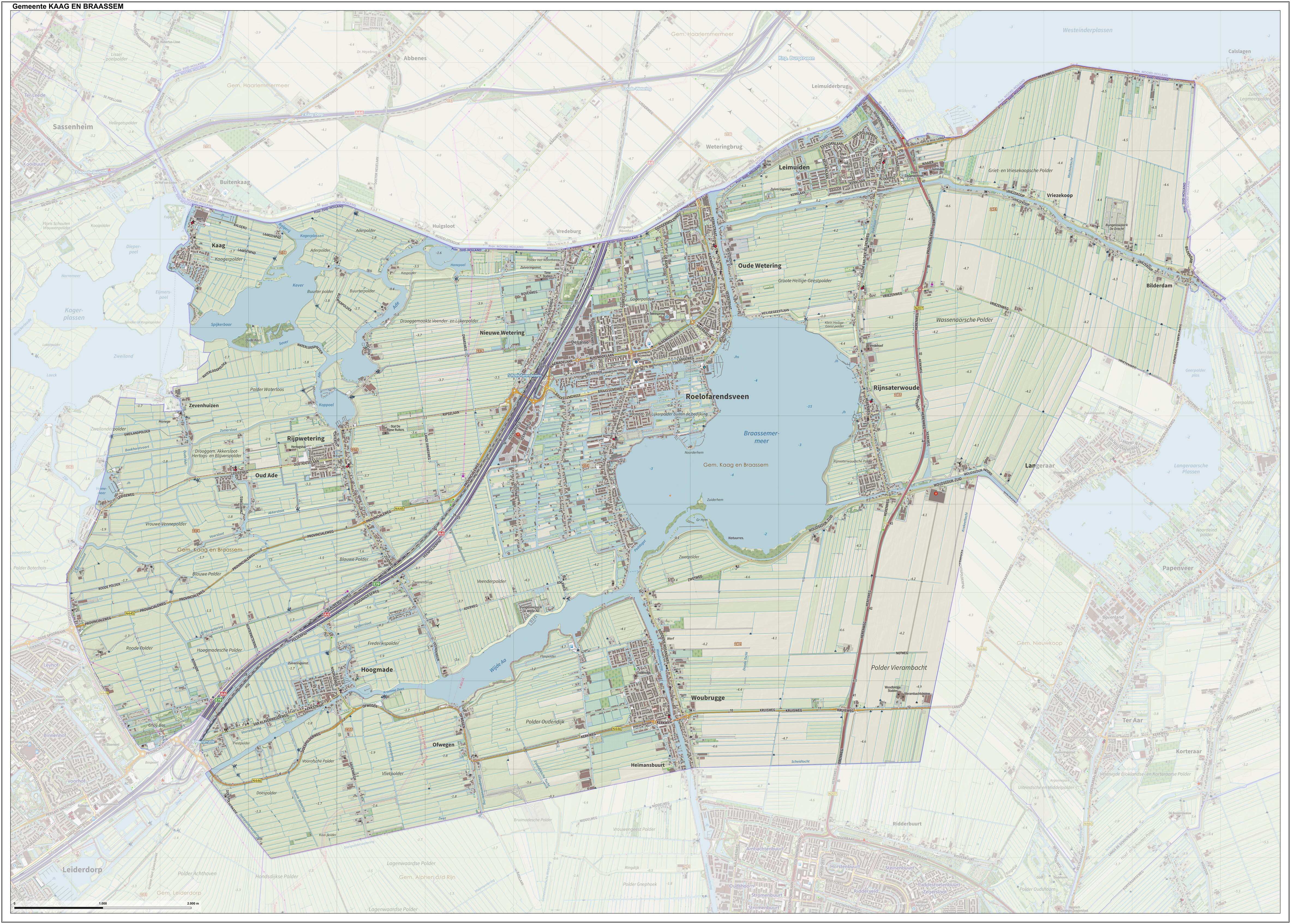 Topografische gemeentekaart. Resolutie: 400 pixels/km. Kaartbeeld samengesteld uit de open geodata van de Top10NL en Top25namen (Kadaster), Creative Commons-BY licentie. Gebouwvlakken uit open geodata BAG extract. Wegen uit de OpenStreetMap, OpenStreetMap community. Reliëfschaduw uit de Actuele Hoogtekaart AHN2. Samenstelling en kleurenschema: Jan-Willem van Aalst, met QGIS. Zie ook de Legenda.